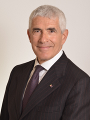 Ritratto Pier Ferdinando Casini